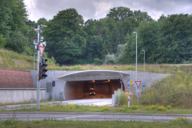 Lohbergtunnel (B426) - Nordportal